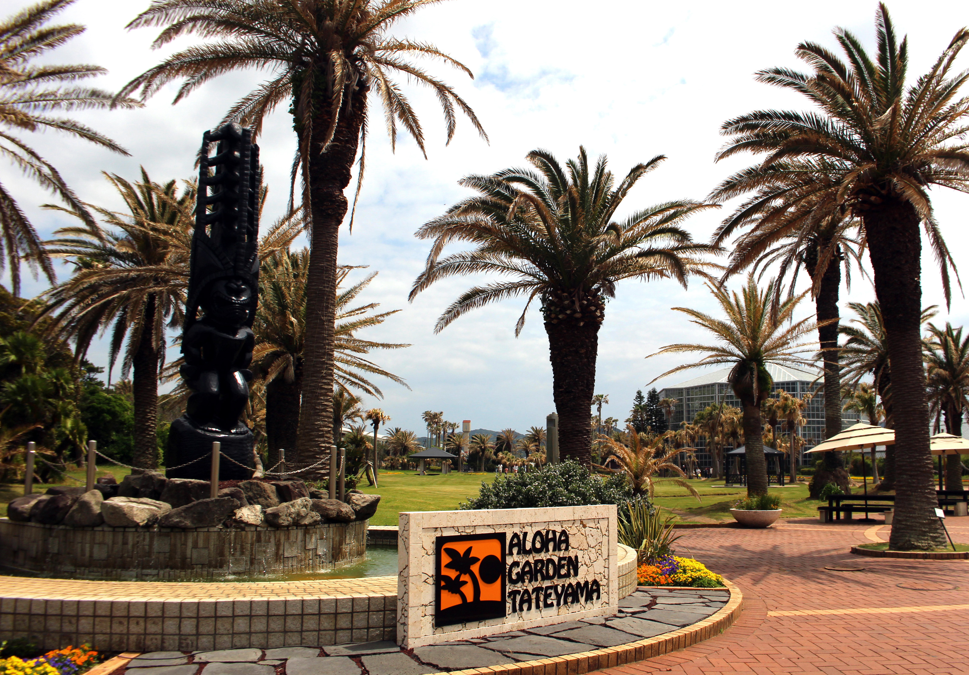 アロハガーデン館山、園内の様子